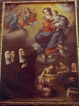 Quadre a Sant Bru de Bordeus, del s. XVII, amb les monges de Lestonnac i Santa Joana de Lestonnac pregant davant Maria